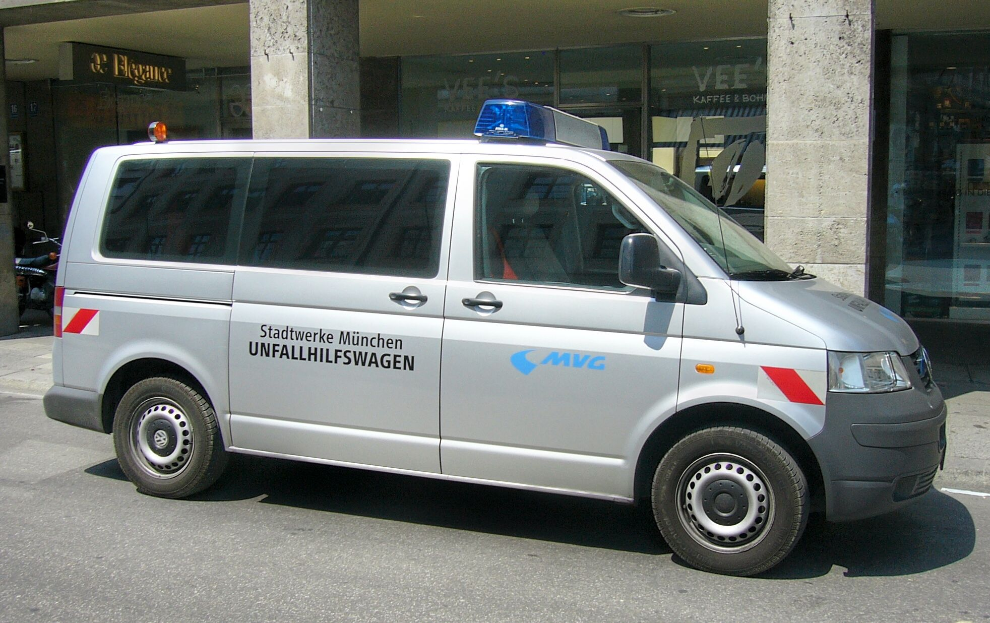 Unfallhilfsfahrzeug der Münchener Verkehrsgesellschaft (Volkswagen T5).